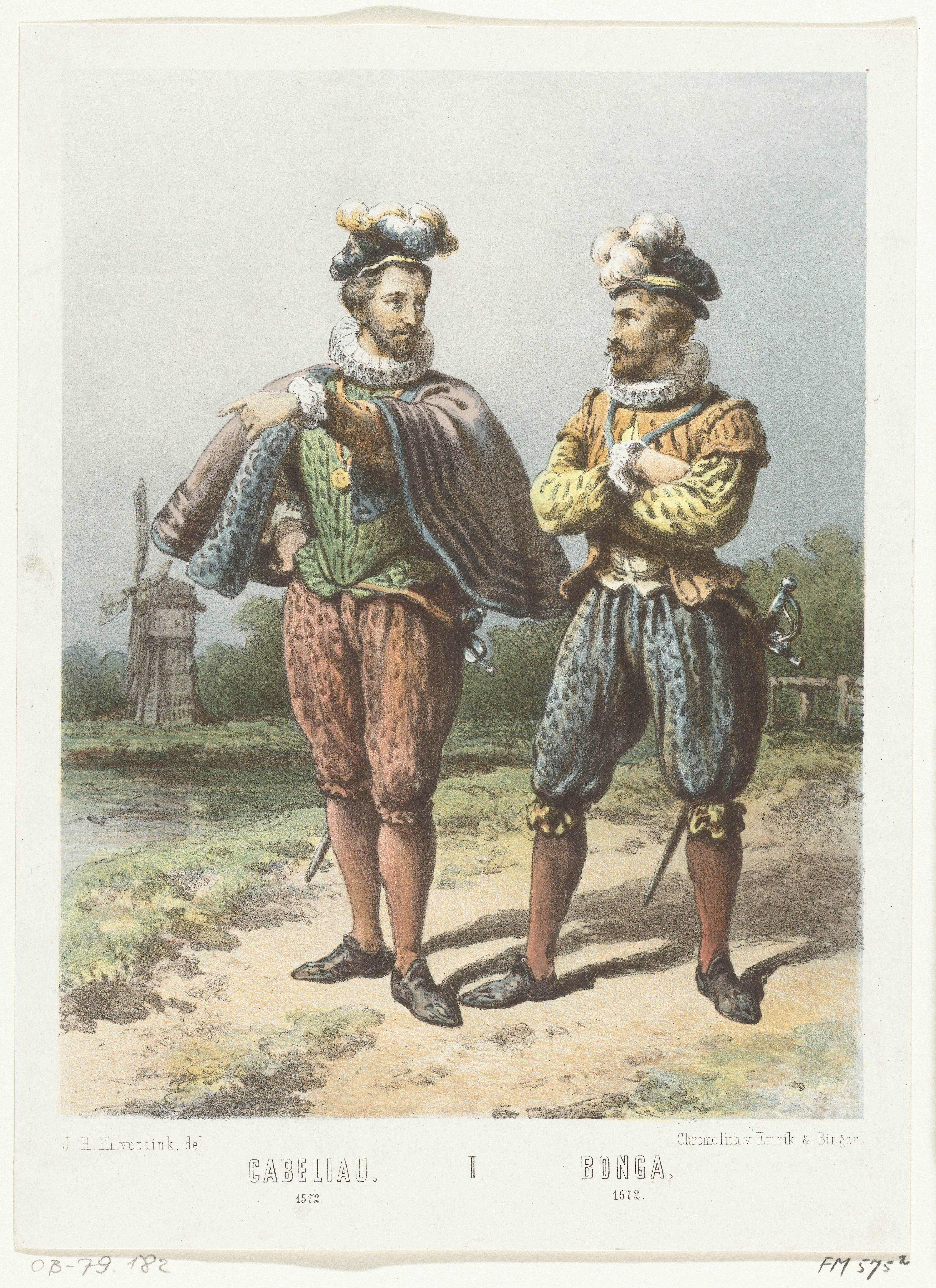 IdentificatieTitel(s): Portretten van de watergeuzen Jacob Cabeljau en Jan Bonga, 1572. Cabeliau 1572 / Bonga 1572 (titel op object)Objecttype: prent historieprent Objectnummer: RP-P-OB-79.182Catalogusreferentie: FMH 575Omschrijving: Portretten van de watergeuzen Jacob Cabeljau en Jan Bonga, op de achtergrond een windmolen, 1572.VervaardigingVervaardiger: prentmaker: anoniem naar tekening van: Johannes Hilverdink (vermeld op object) drukker: Emrik & Binger (vermeld op object)Plaats vervaardiging: NederlandDatering: 1825 - 1899Fysieke kenmerken: chromolithografieMateriaal: papier Techniek: chromolithografieAfmetingen: blad: h 275 mm × b 202 mmToelichtingStaat met de letter.OnderwerpWat: de soldaat; het leven van een soldaatWanneer: 1572 - 1572Wie: Jacob Cabeliau, Jan BongaVerwerving en rechtenVerwerving: aankoop 1881Copyright: Publiek domein